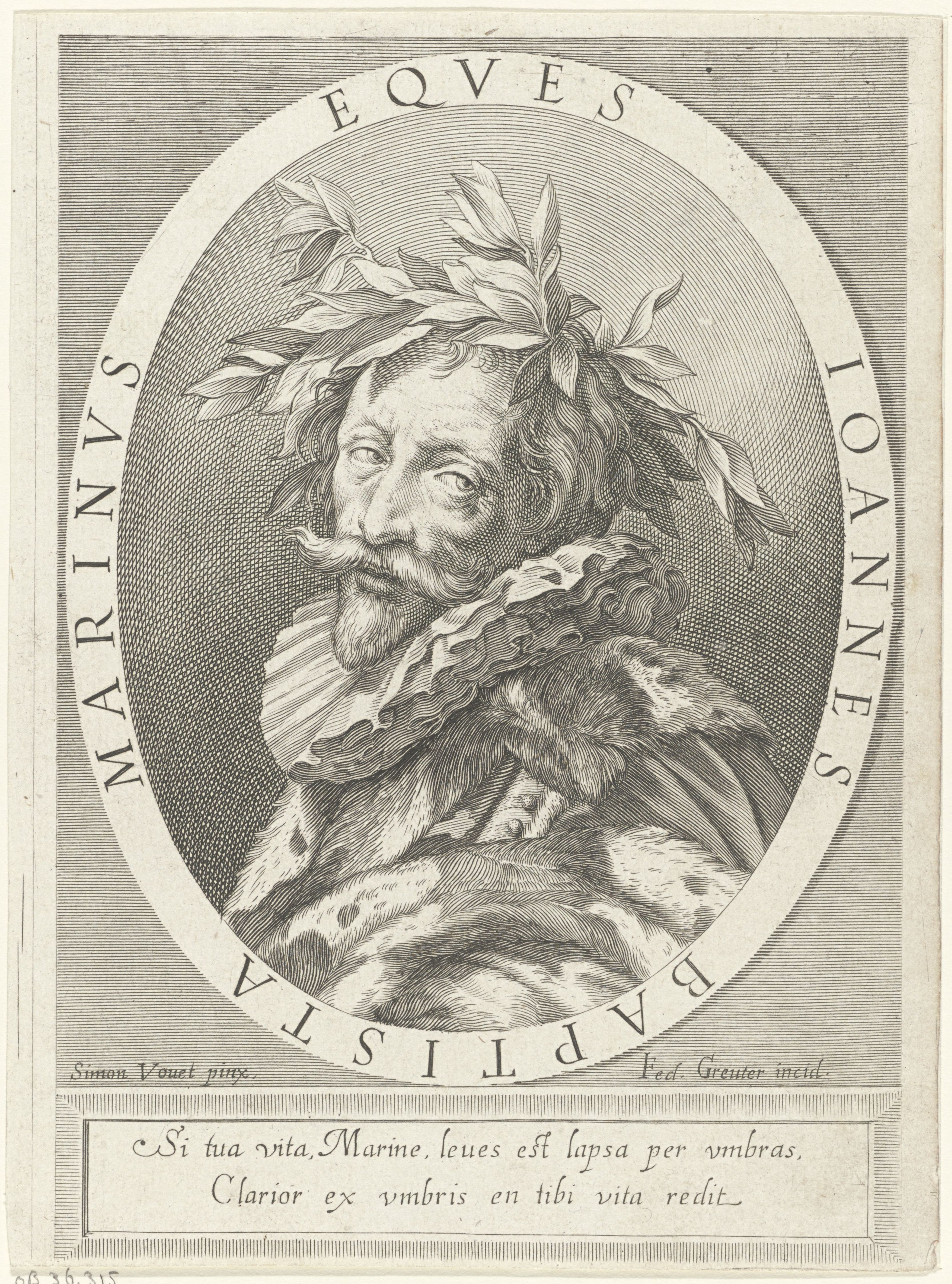 IdentificatieTitel(s): Portret van dichter Giovanni Battista MarinoObjecttype: prent Objectnummer: RP-P-OB-36.315Catalogusreferentie: Hollstein German 34Opschriften / Merken: verzamelaarsmerk, verso, gestempeld: Lugt 2228VervaardigingVervaardiger: prentmaker: Johann Friedrich Greuter (vermeld op object)naar schilderij van: Simon Vouet (vermeld op object)Plaats vervaardiging: ItaliëDatering: 1599 - 1662Fysieke kenmerken: gravureMateriaal: papier Techniek: graveren (drukprocedé)Afmetingen: blad: h 197 mm (Binnen plaatrand afgesneden.) × b 147 mm (Binnen plaatrand afgesneden.)OnderwerpWat: historical personswriter, poet, authorportrait of a writerWie: Giovanni Battista MarinoVerwerving en rechtenVerwerving: onbekend 2006Copyright: Publiek domein